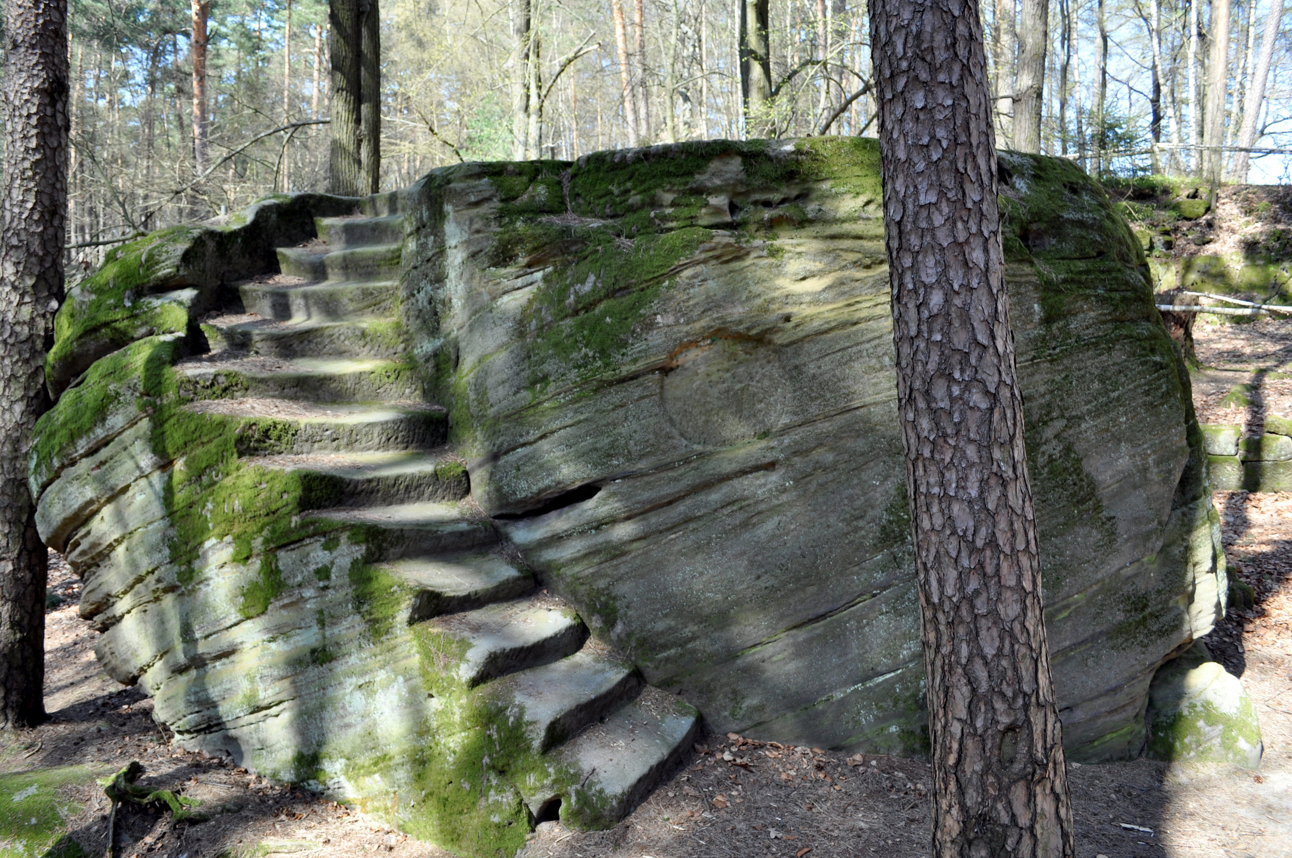 Der Treppenstein der Ebnether Keller. Obendrauf findet sich eine eingemeiselte Opfermulde, die von Esoterikern nicht als solche angesehen wird, sondern der ganze Zeit aufgrund dieser Mulde als "Heilstein für Frauenleiden" gedeutet wird.